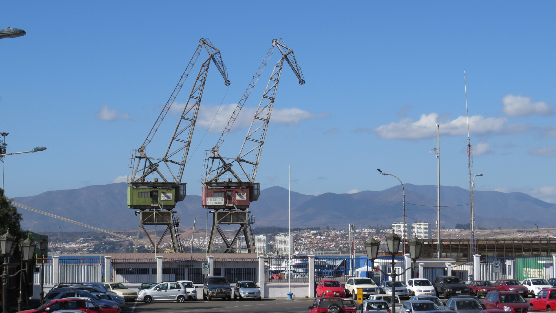 gruas Krupp-Ardelt